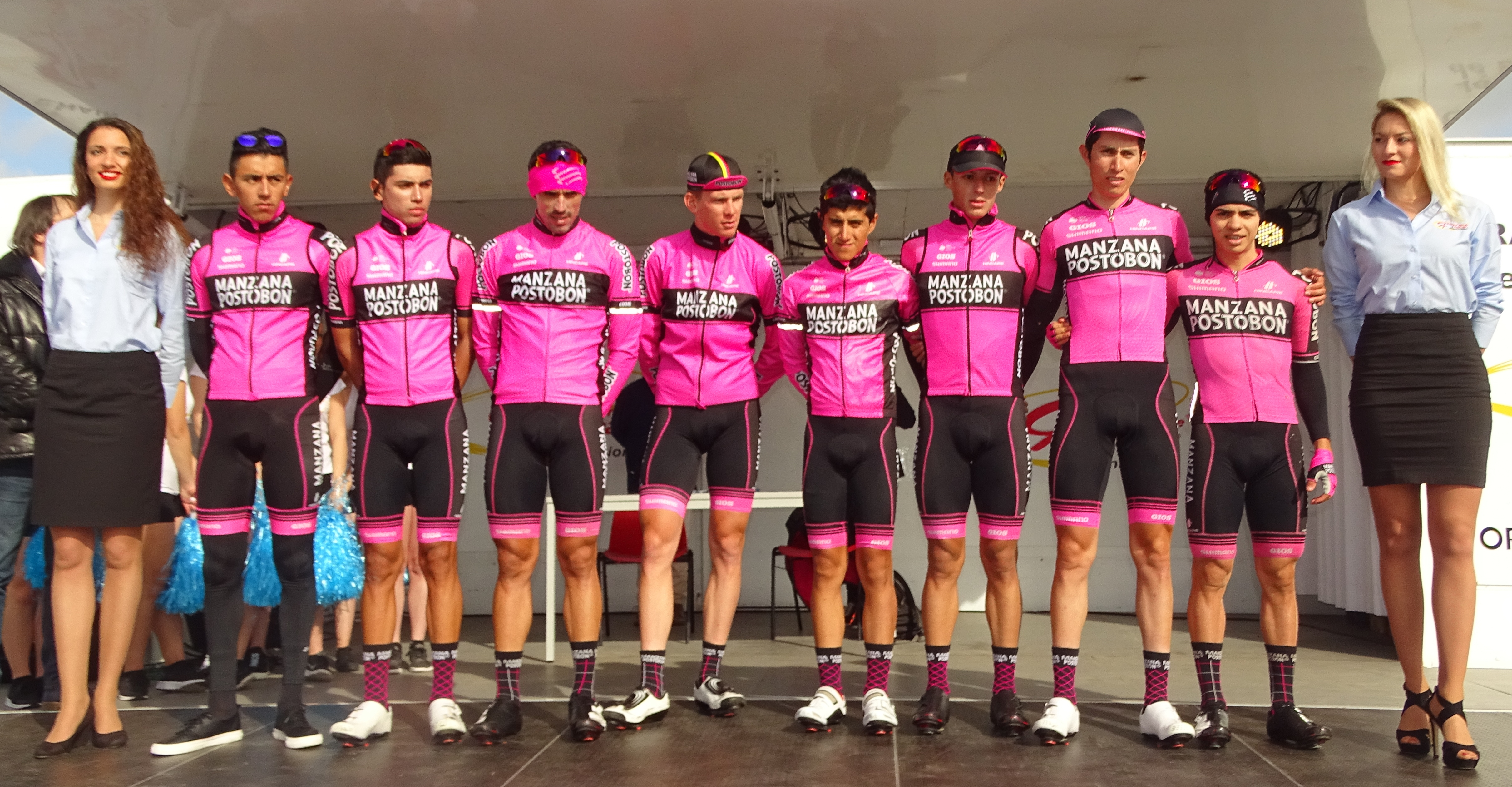 Reportage réalisé le jeudi 13 avril à l'occasion du départ et de l'arrivée du Grand Prix de Denain 2017 à Denain, Nord, Nord-Pas-de-Calais-Picardie, France.